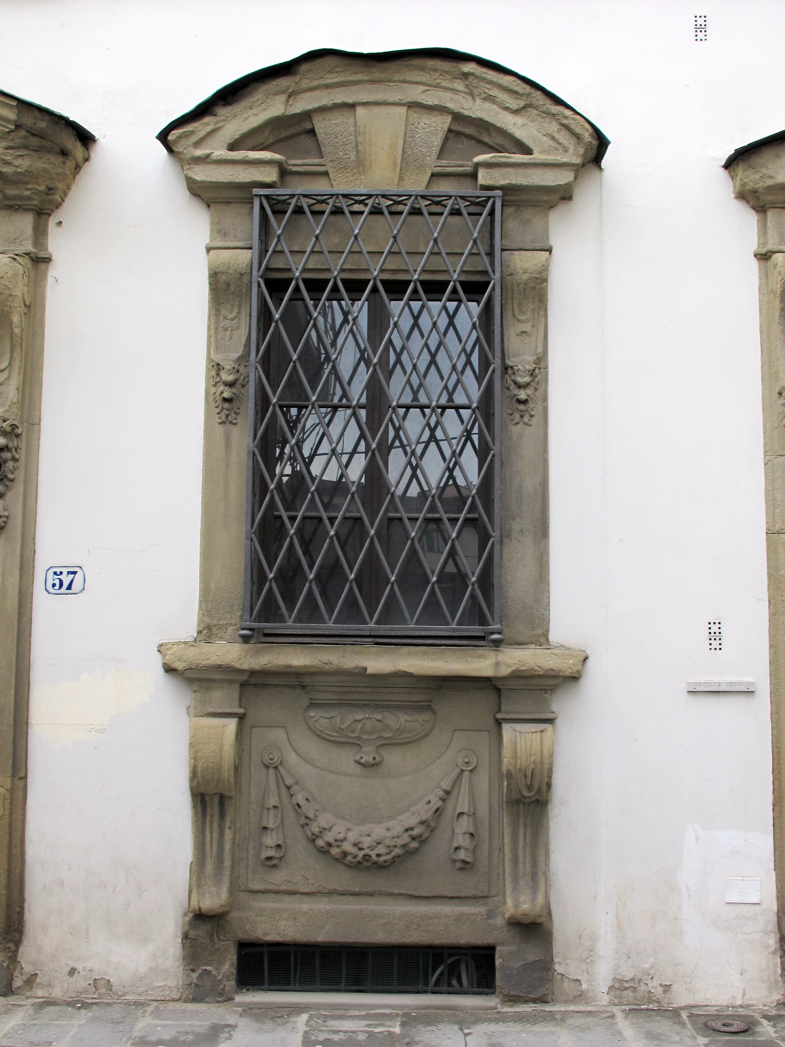 Via della Pergola, Firenze